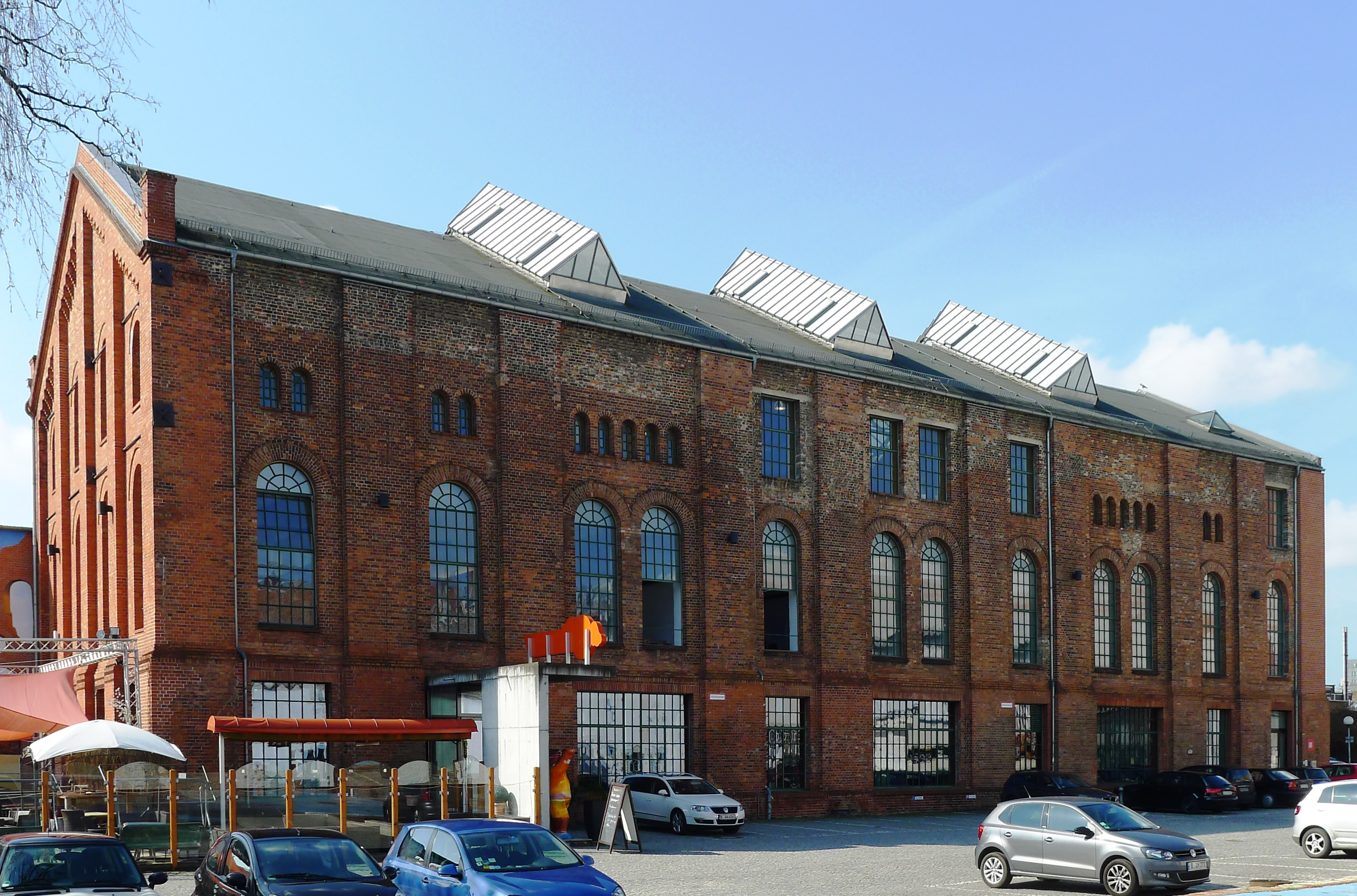 Fabrikhalle einer ehemaligen Maschinenfabrik